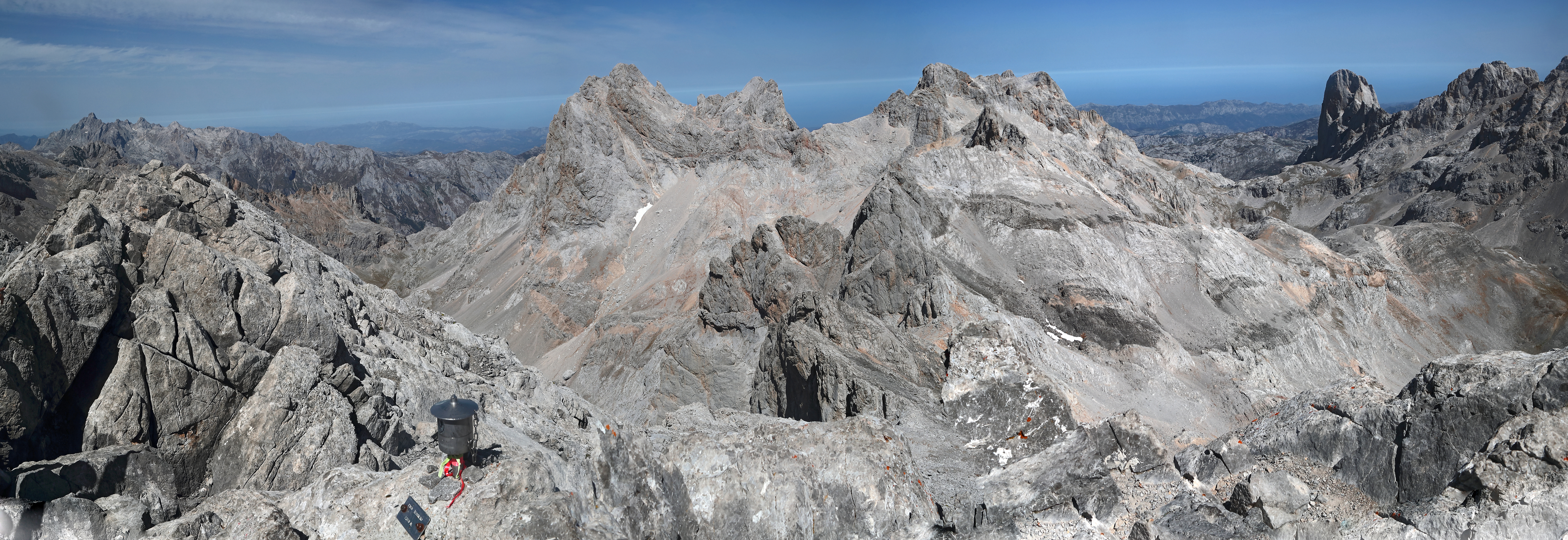 Panorámica Torrecerredo